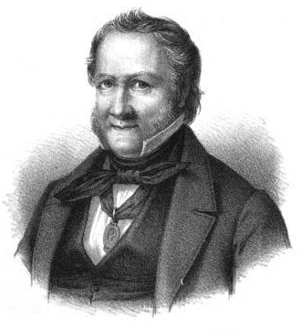 Norsk (bokmål): Lyder Sagen (1777–1854).